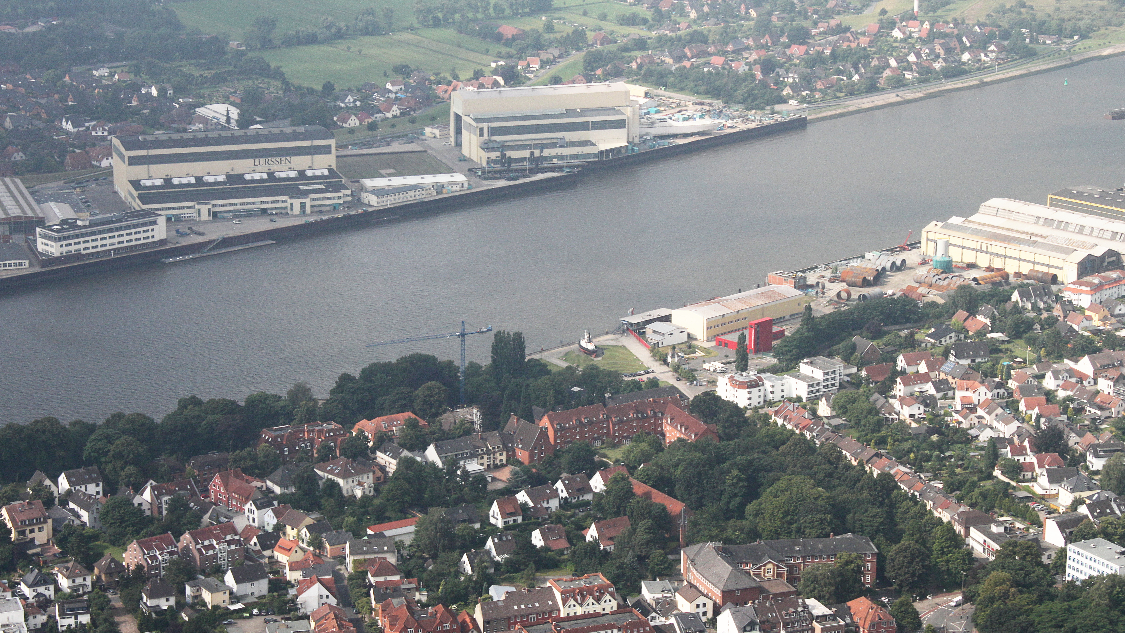 Fotoflug Bremen; Flughöhe 500 m; von der Autobahnabfahrt der A 27 in Bremen-Nord über Vegesack zum U-Boot Bunker Valentin